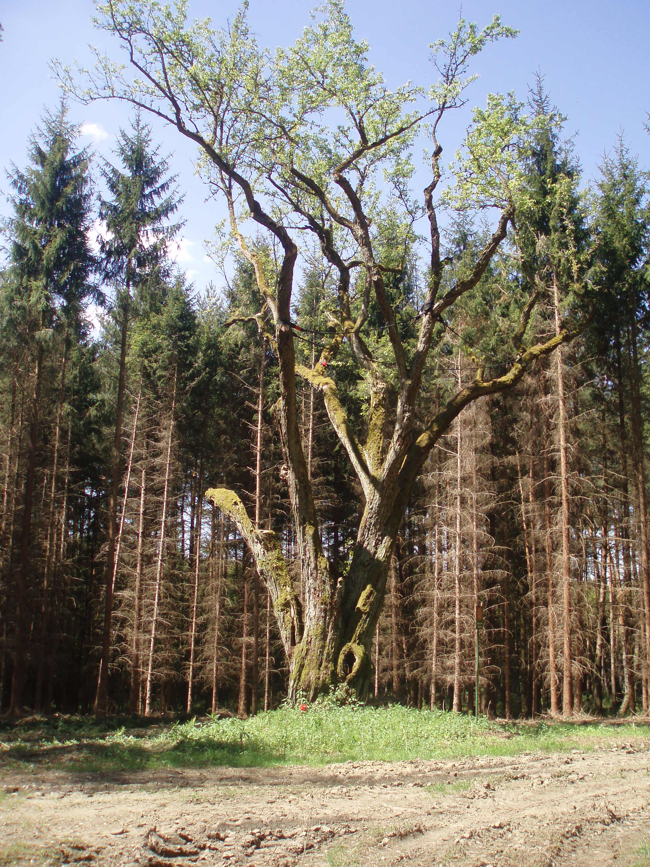 Pastýřova hruška u Únějovic, okres Domažlice, po vykácení náletových dřevin v bezprostřední blízkosti.